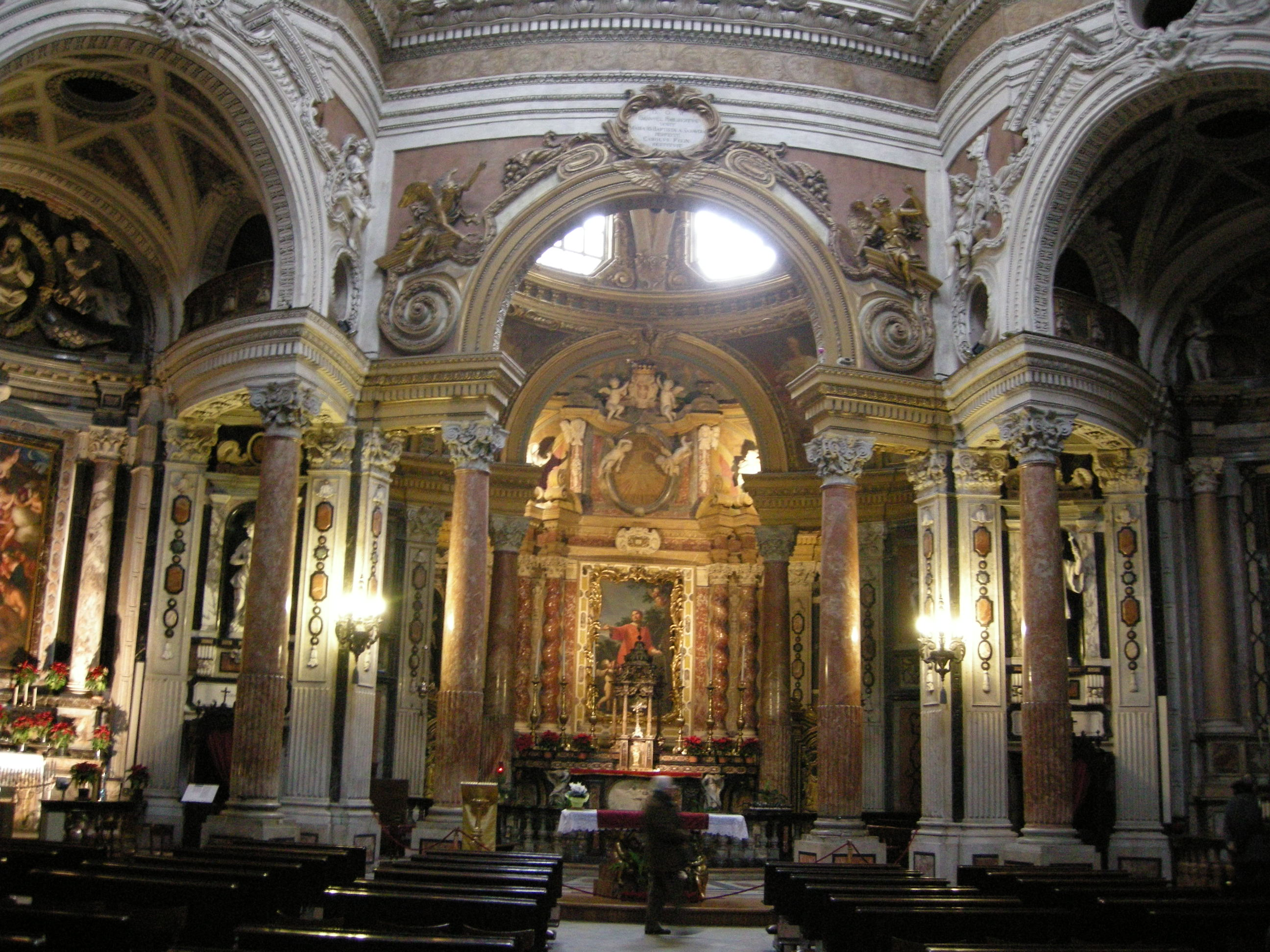 Torino, san lorenzo